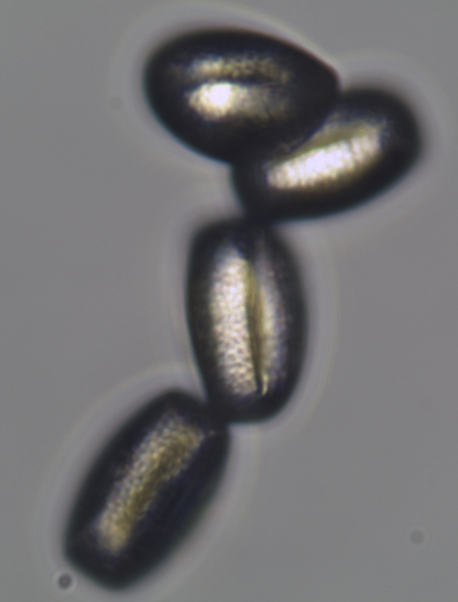 Pollen der Akelei (400x)